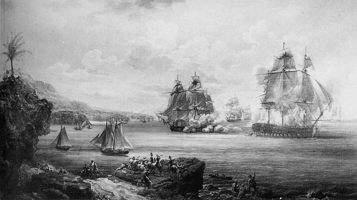 Combat de la frégate française "La Poursuivante" contre le vaisseau anglais "Hercule", 28 juin 1803 (huile sur toile, Louis-Philippe Crépin, 1819) - Musée national de la Marine